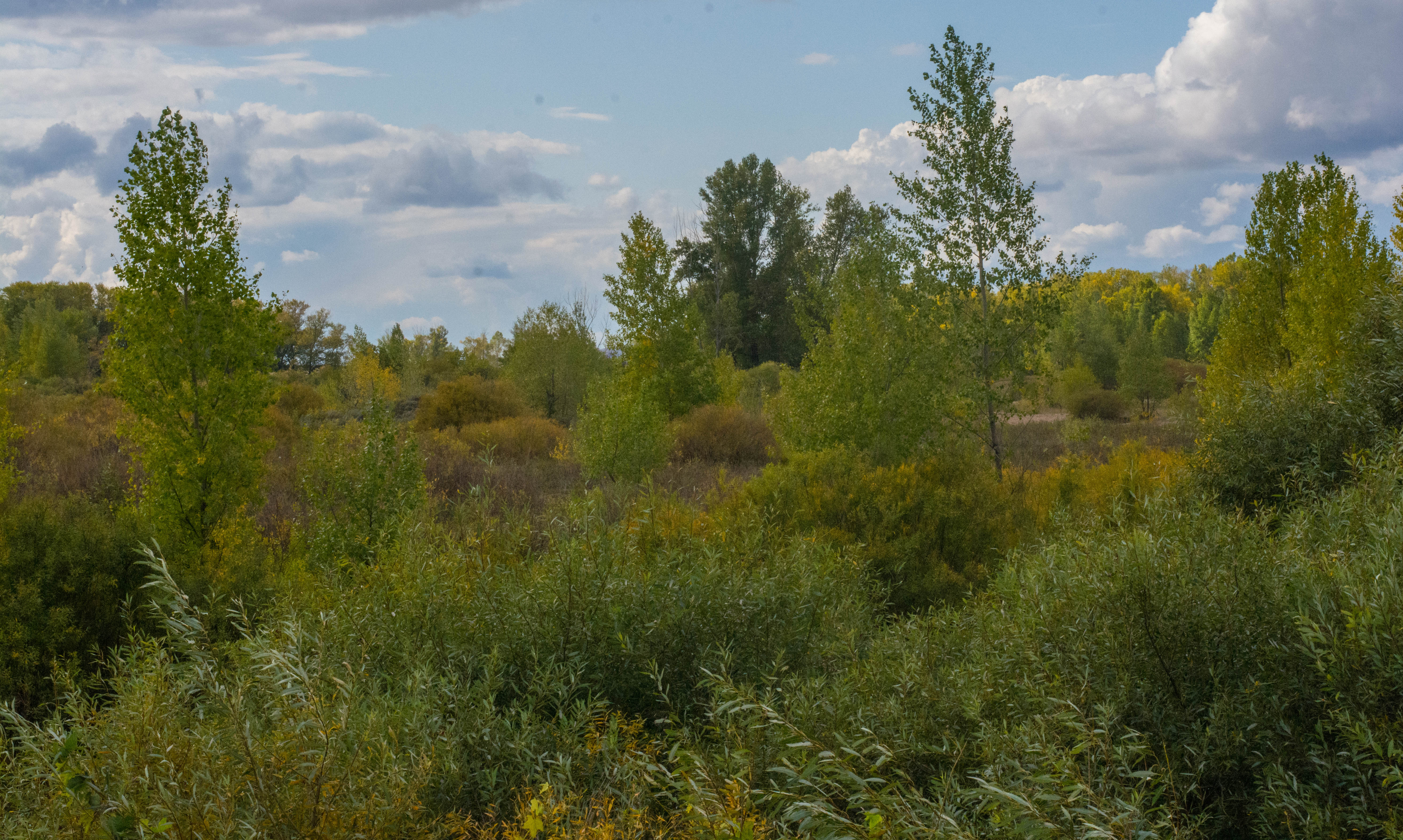 Черноречье, достопримечательное место, регистрационный номер 741731296680005 (Троицкий район, участок правого берега реки Уй, расположенный в 0,7 км. южнее поселка Черноречье) - объект культурного наследия регионального значения (эпоха бронзы).